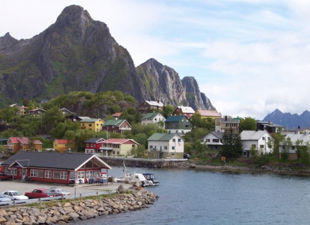 Svolvær in Lofoten, Norway. From the ferry harbour Description in de wikipedia: Lofoten, am Fährhafen Svolvear, während der Ausfahrt, eigenes Bild, GFDL